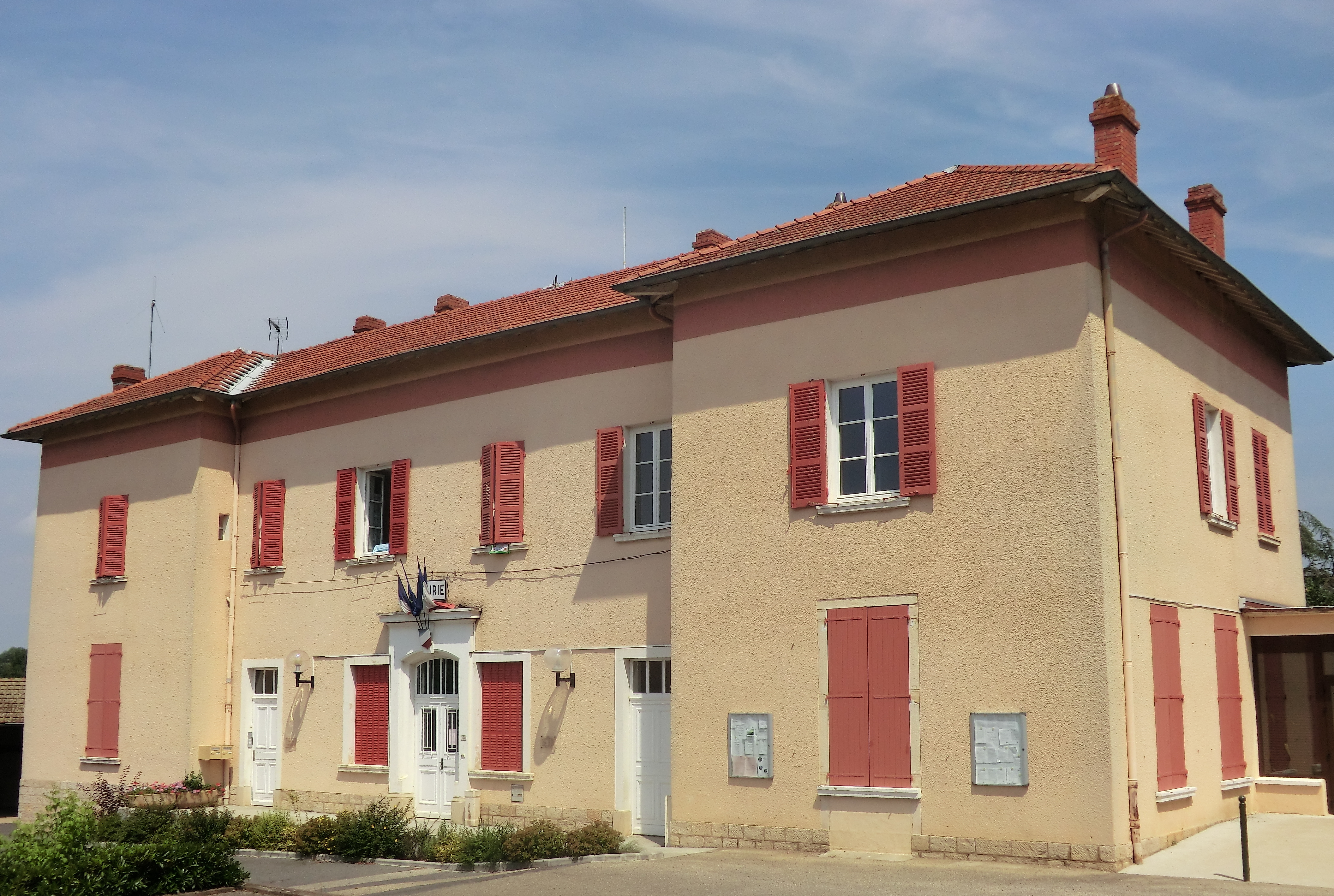 Mairie de Saint-Didier-de-Formans.